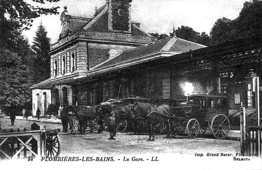 Place de la gare et bâtiment voyageurs de la gare de Plombières-les-Bains au début des années 1900.